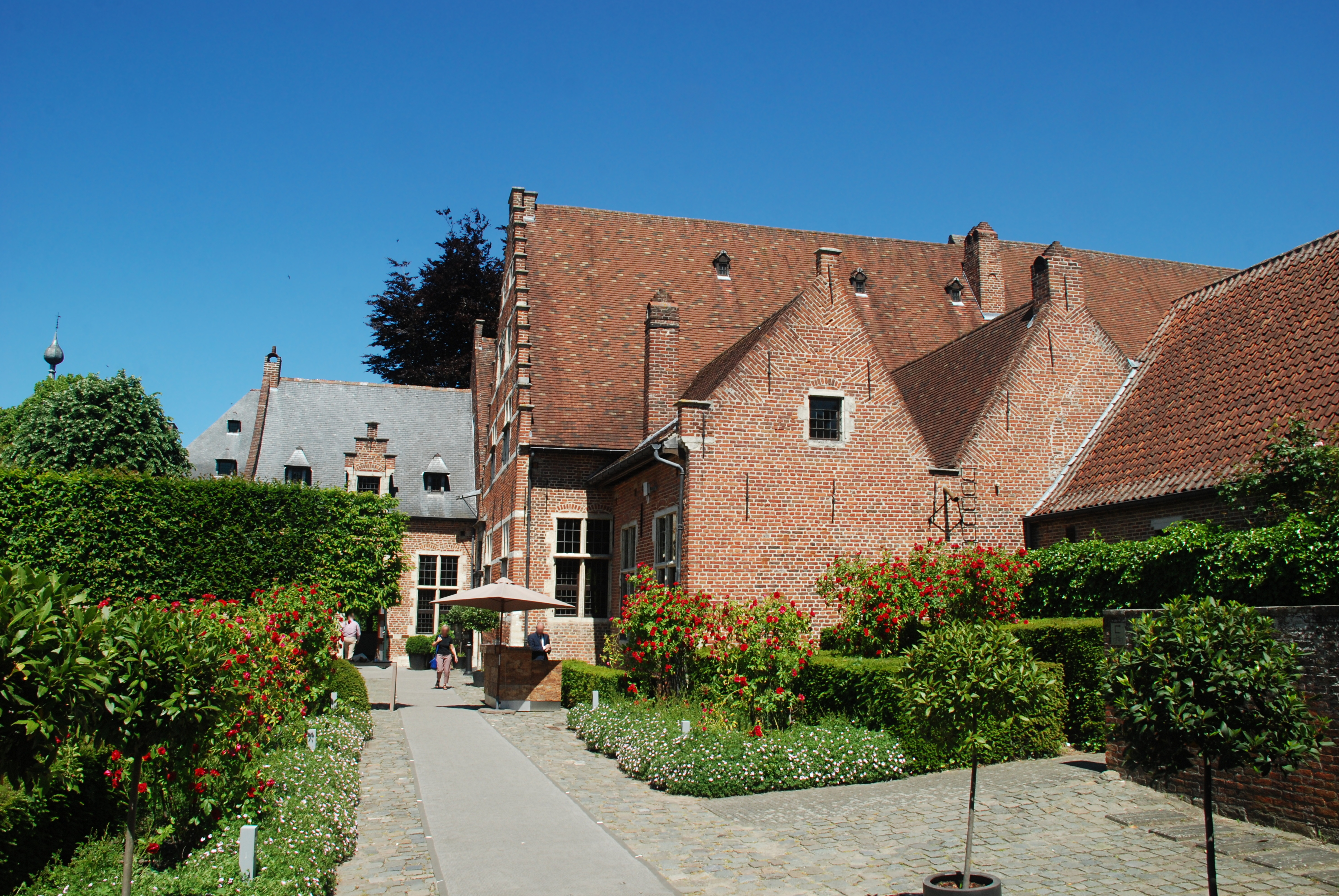 Belgium - Leuven - Groot Begijnhof - Faculty Club